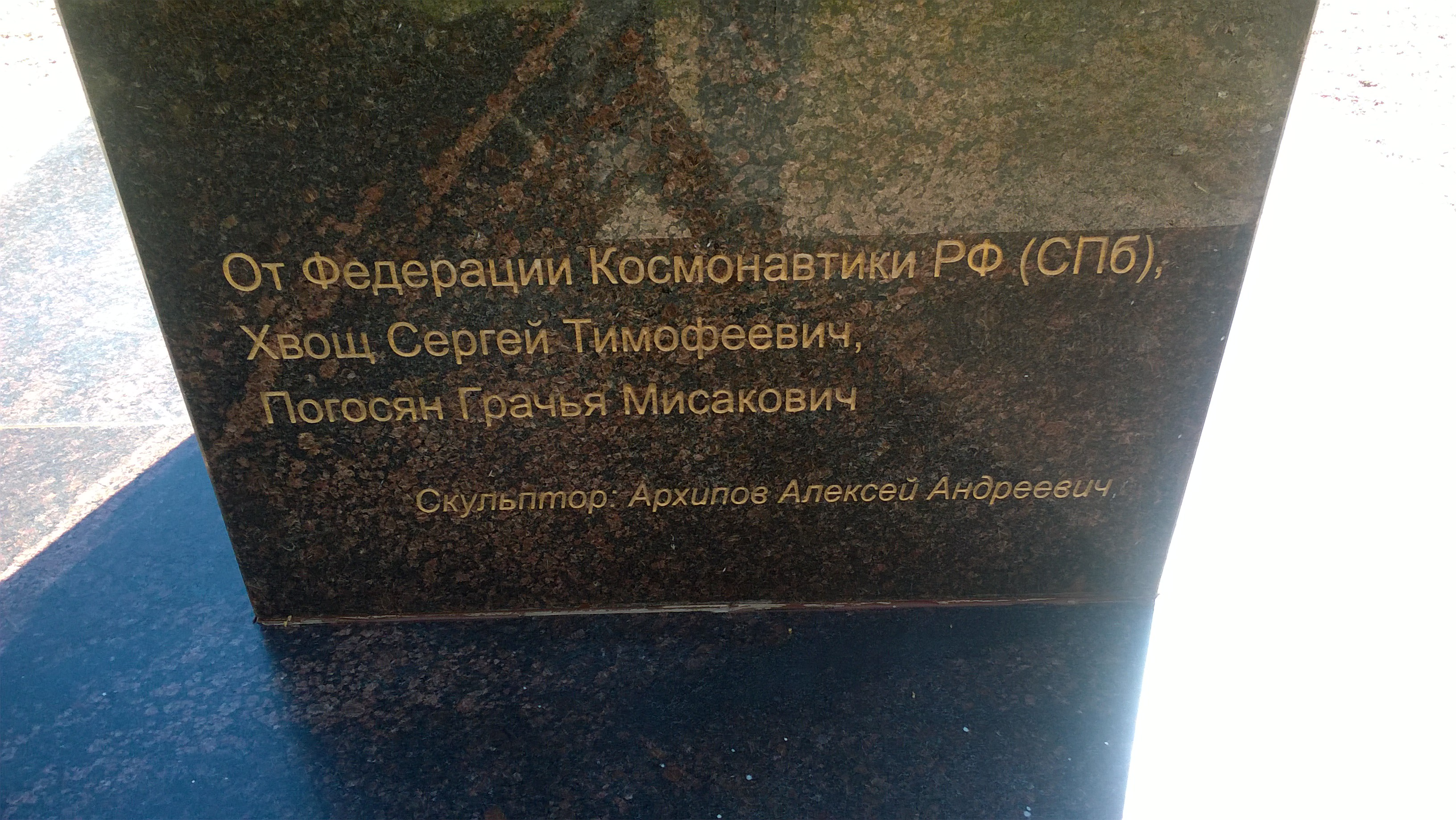 От федерации космонавтики РФ СПб Хвощь Сергей Тимофеевич Погосян Грачья Мисакович Скульптор: Архипов Алексей Андреевич